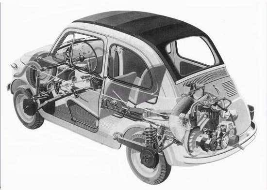 Scansione da foto pubblicitaria originale